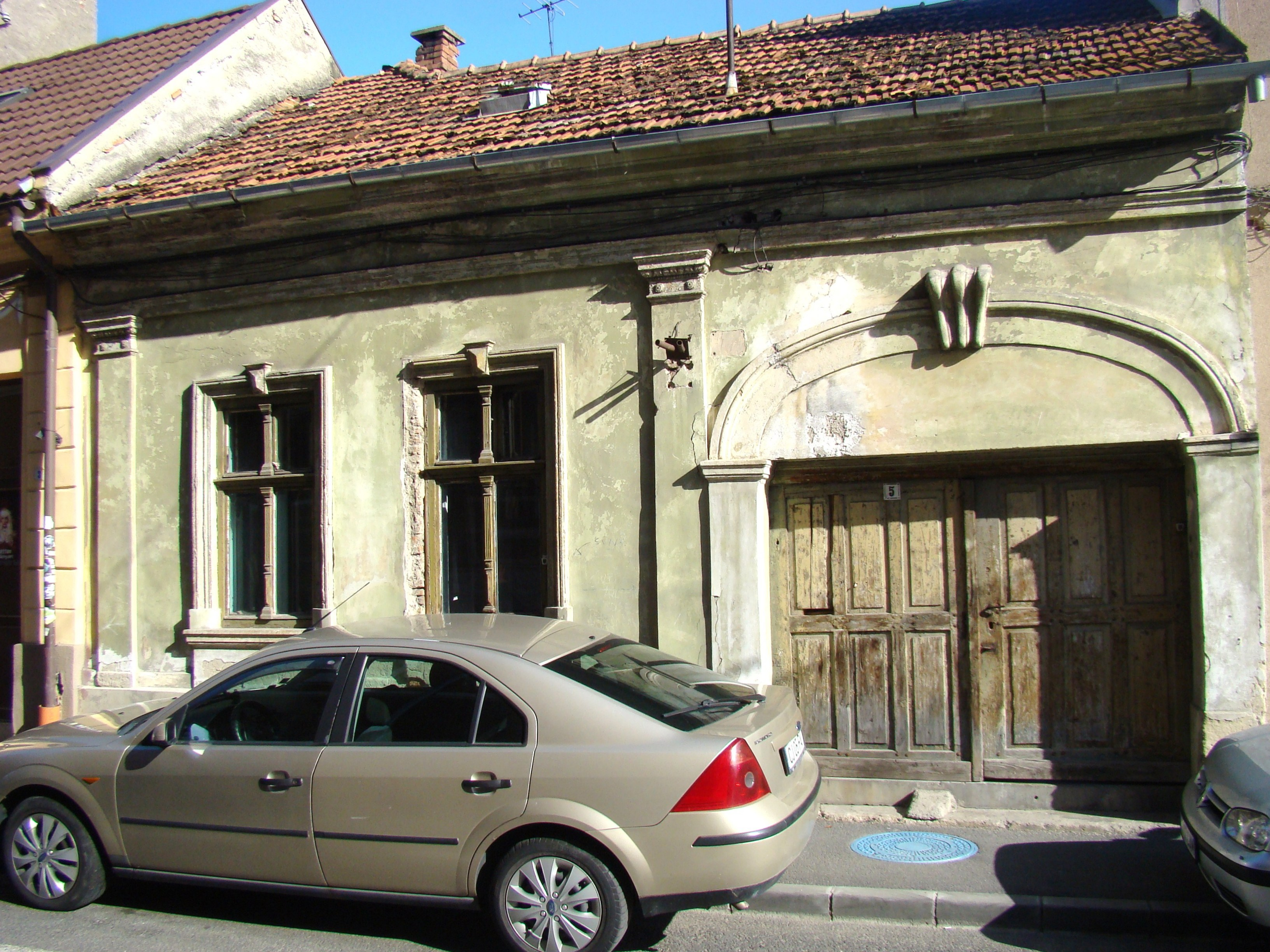 Casă monument, str.Daicoviciu, nr.5